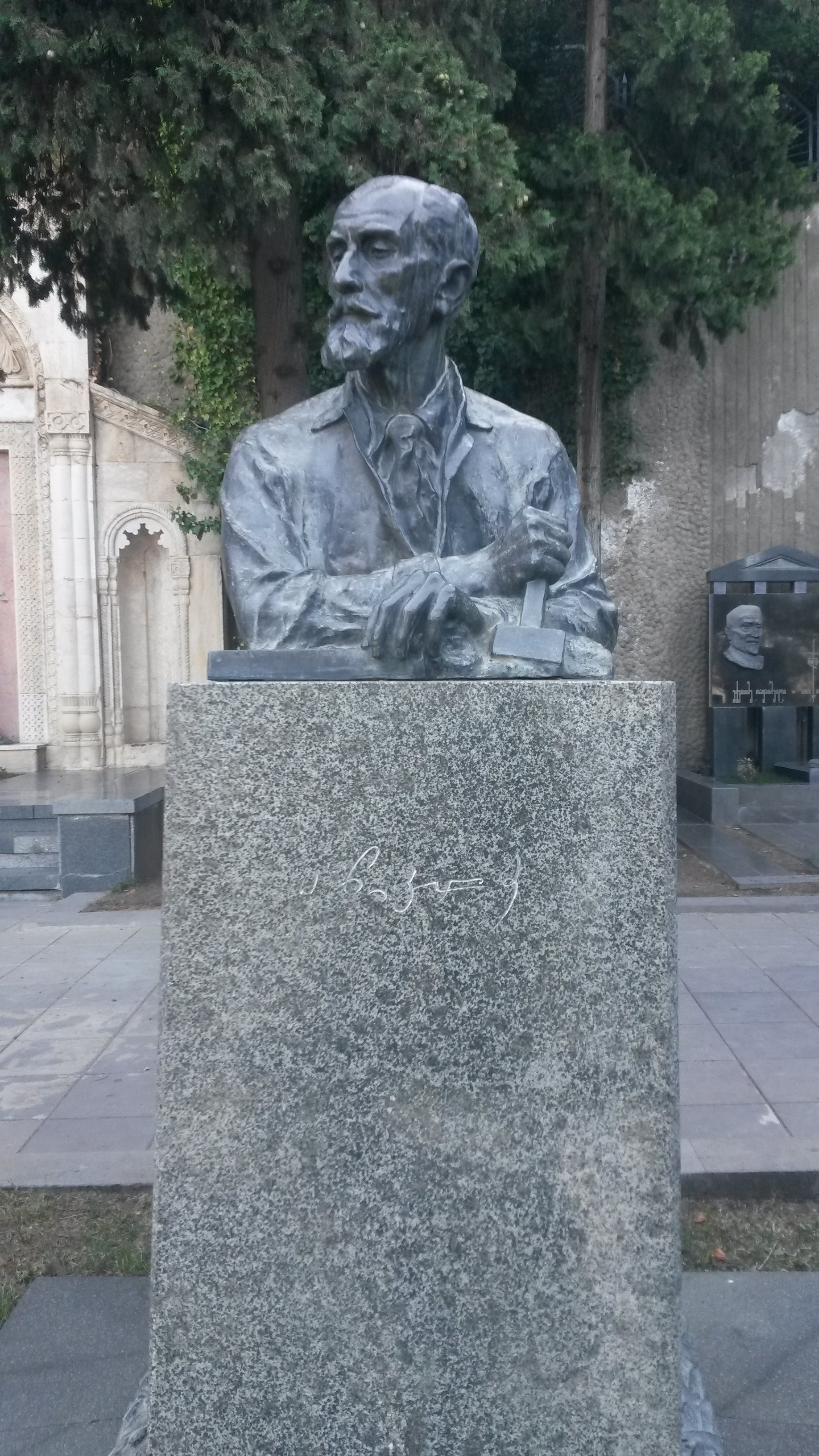 მთაწმინდის პანთეონი